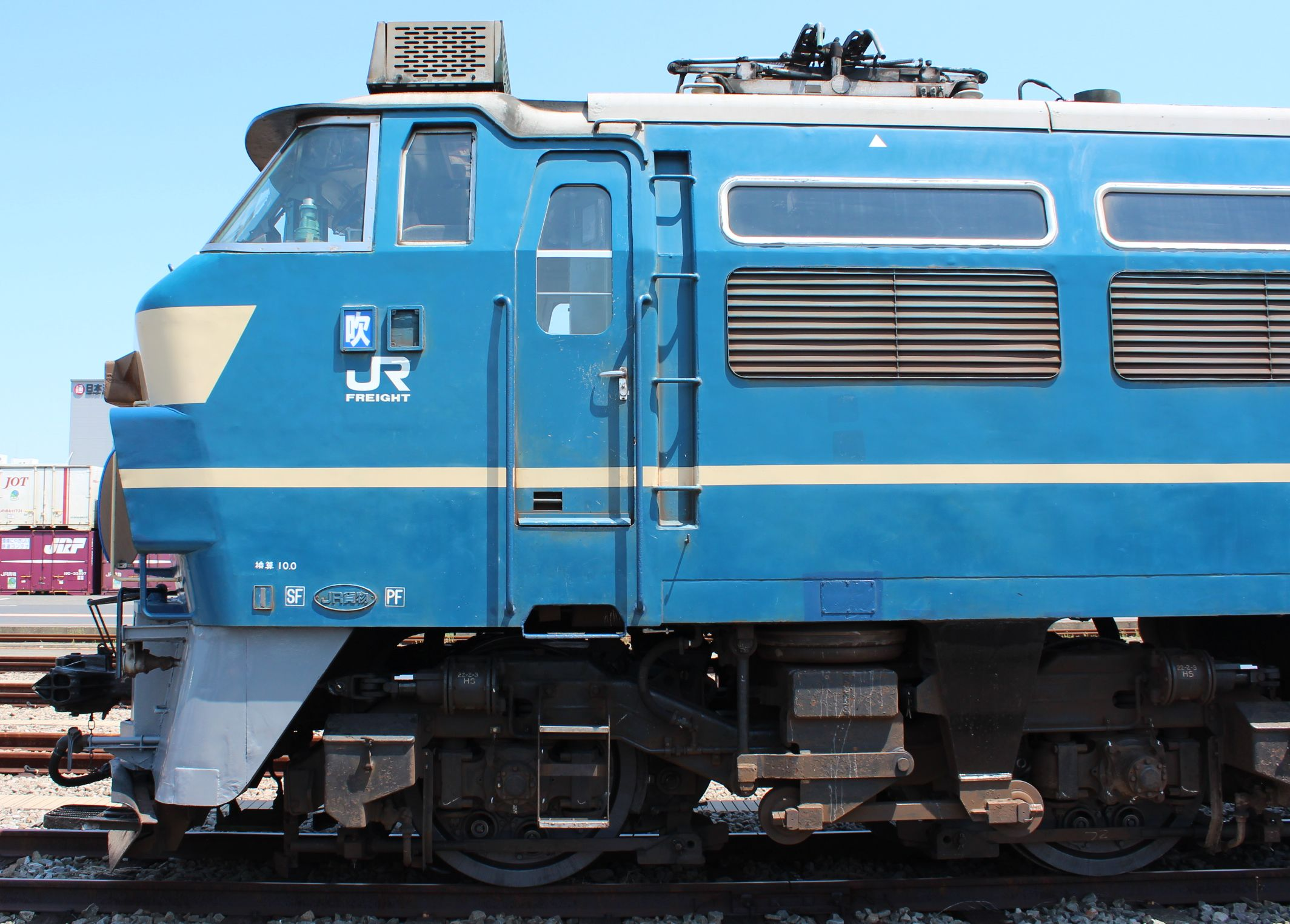 国鉄EF66形電気機関車